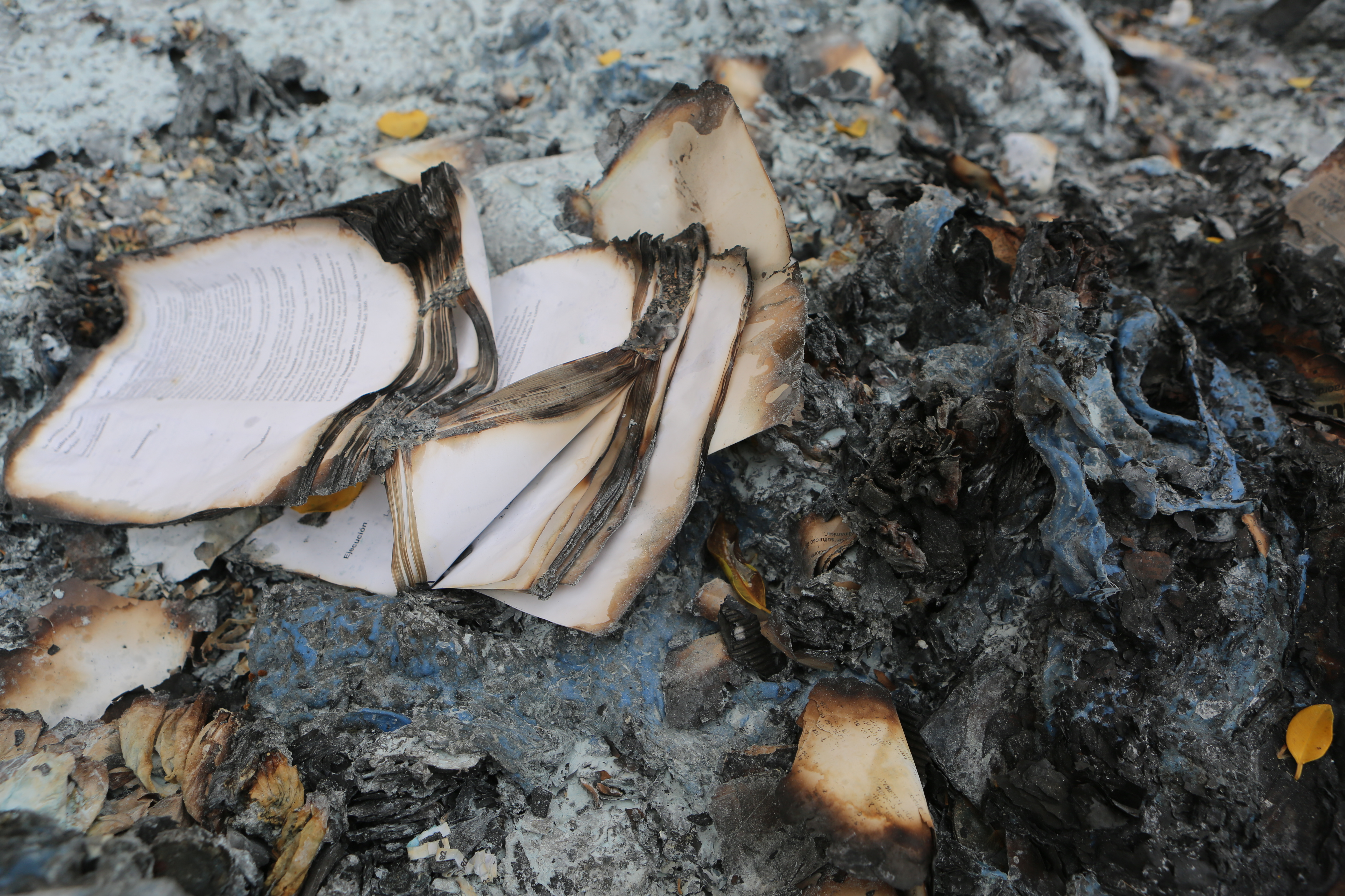 book-book-pages-burned-pages